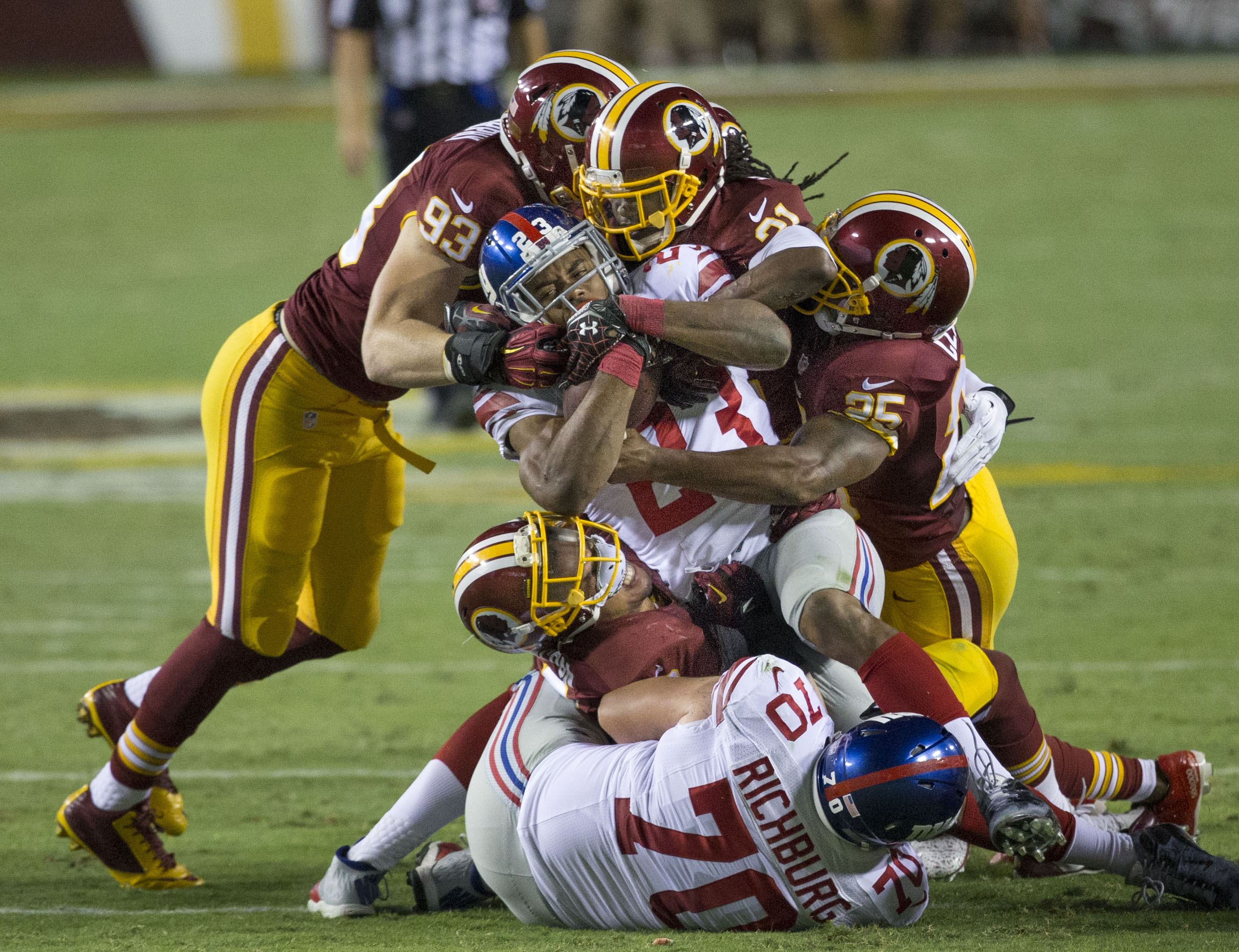 Giants at Redskins 9/25/14